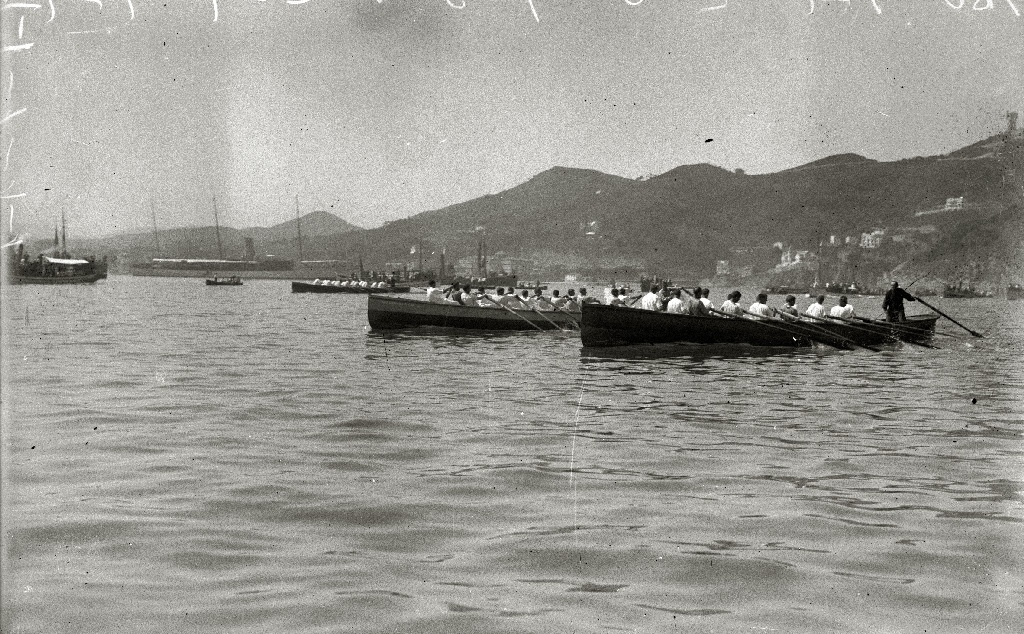 Título original: Regatas de traineras. Bandera de la Concha (1/2) Localización: San Sebastián (Guipúzcoa)